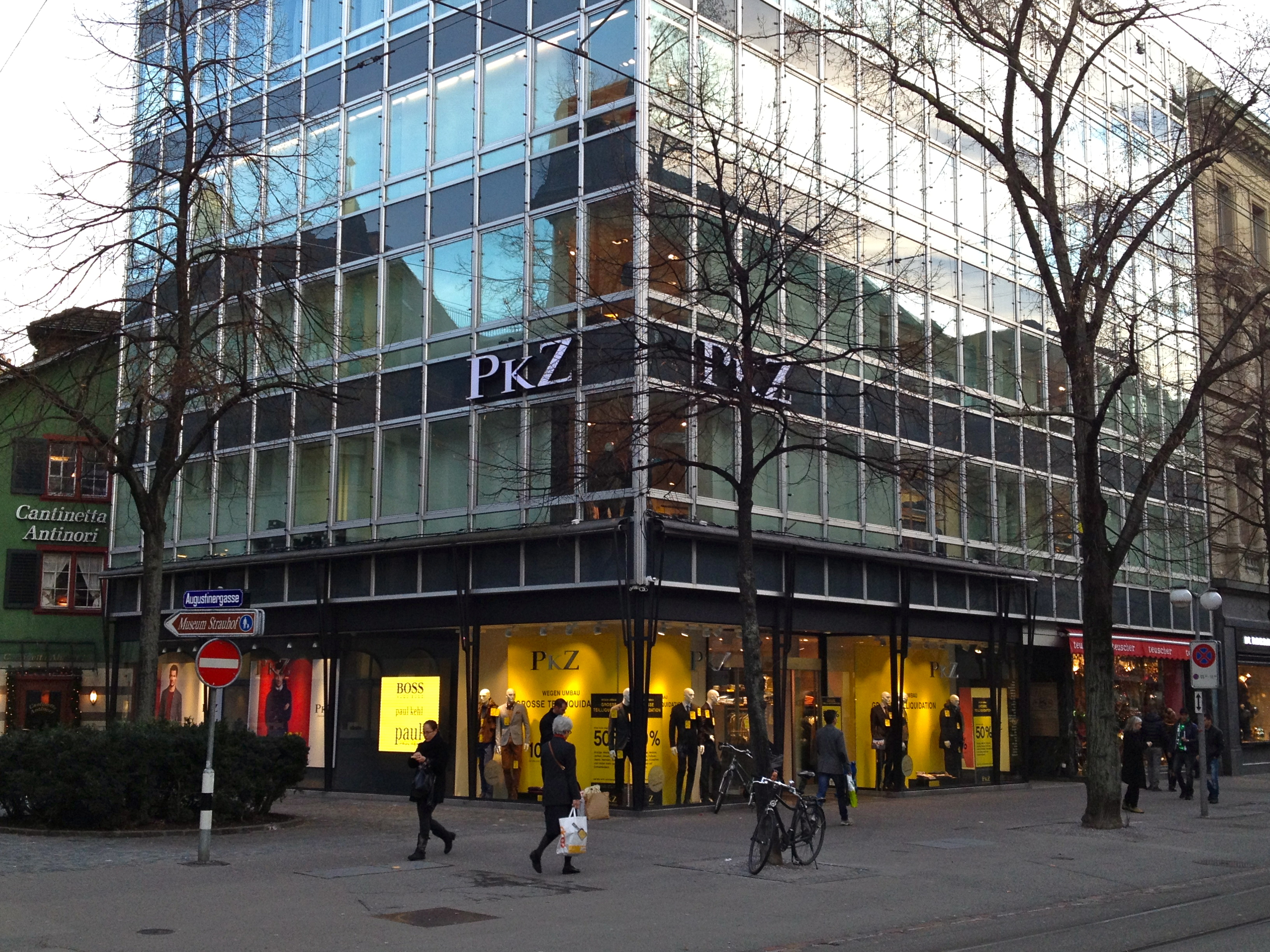 PKZ